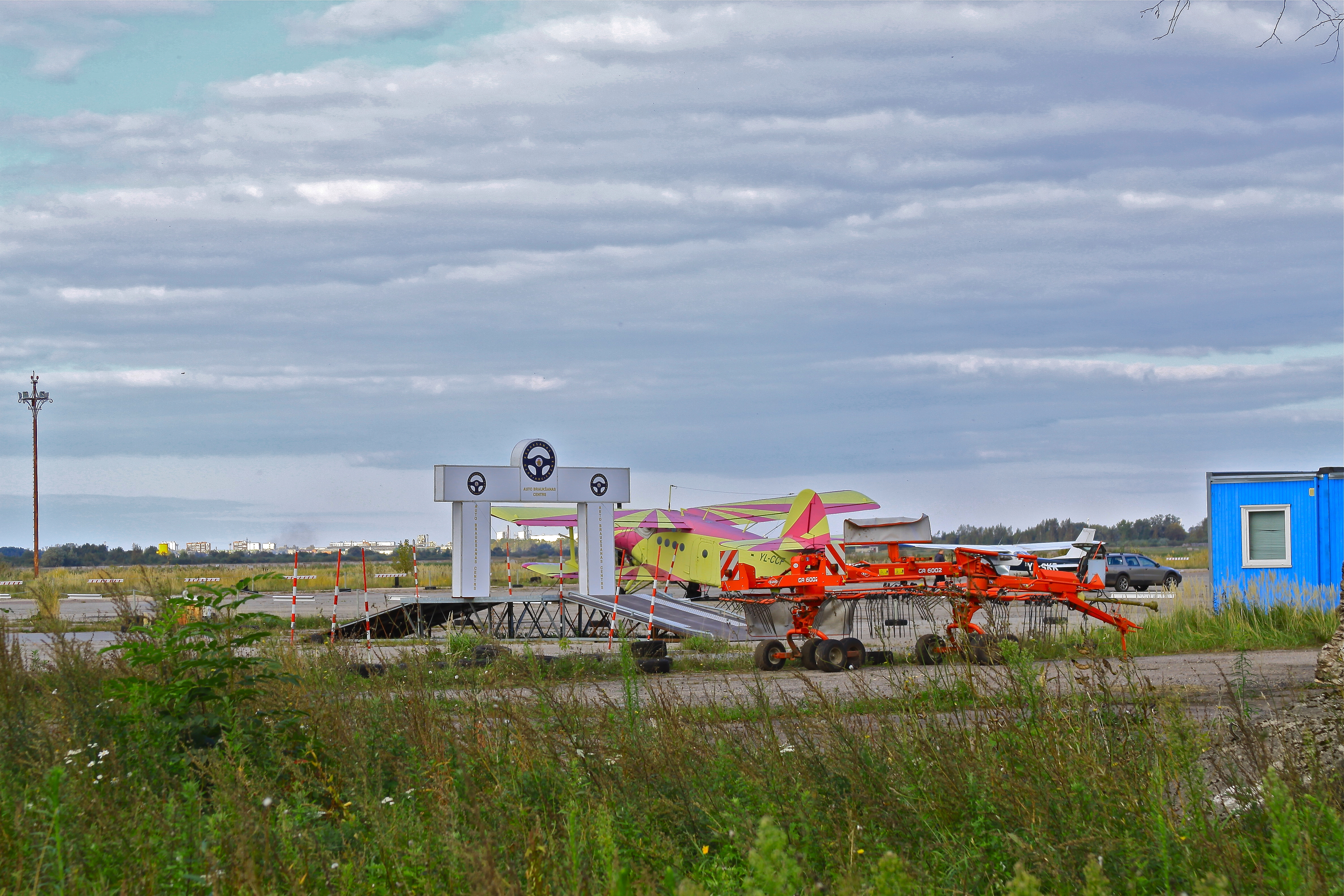 Фото лётного поля бывшего аэропорта Спилве в Риге